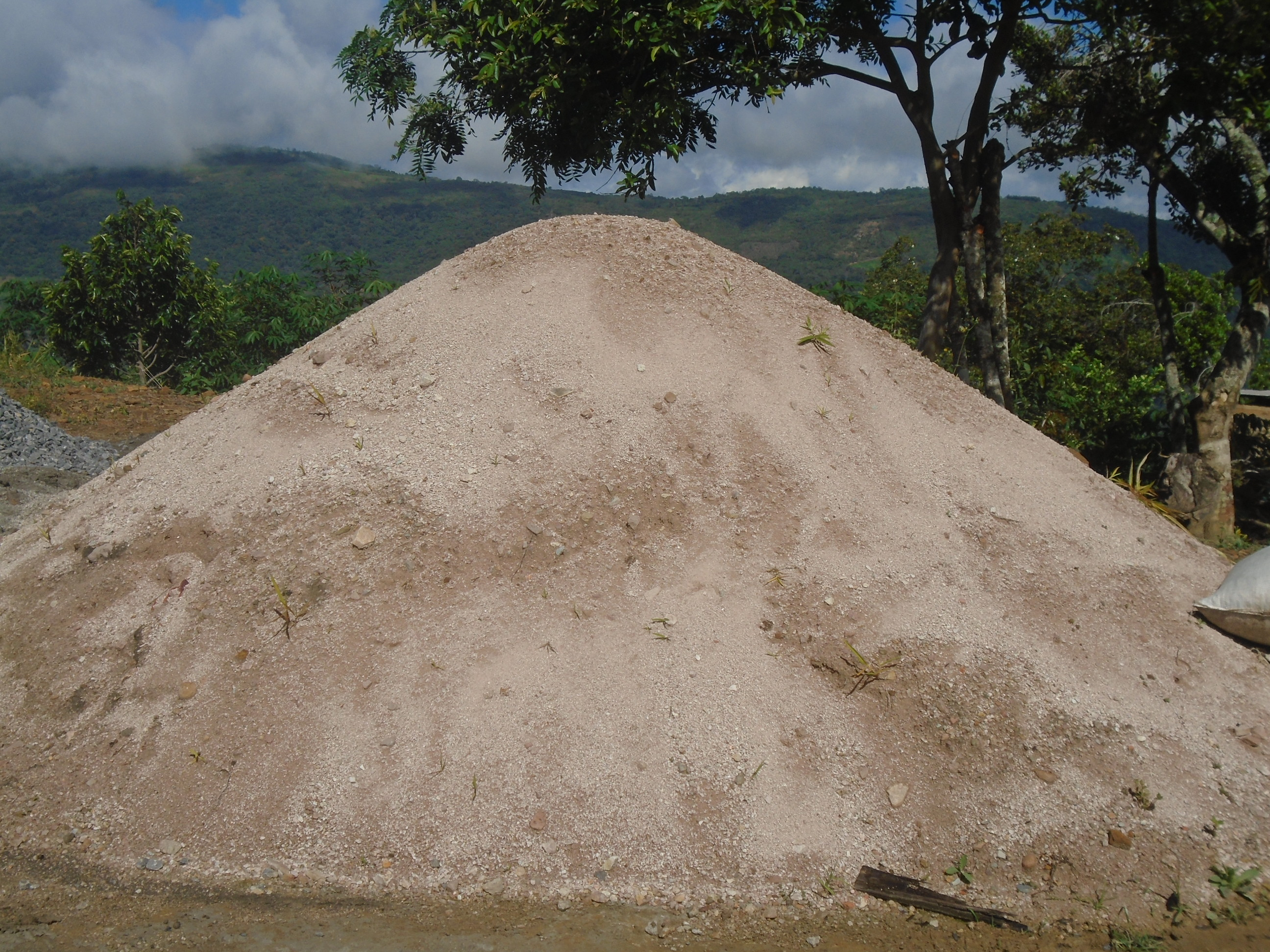 Una montaña de arena de sílice para la construcción